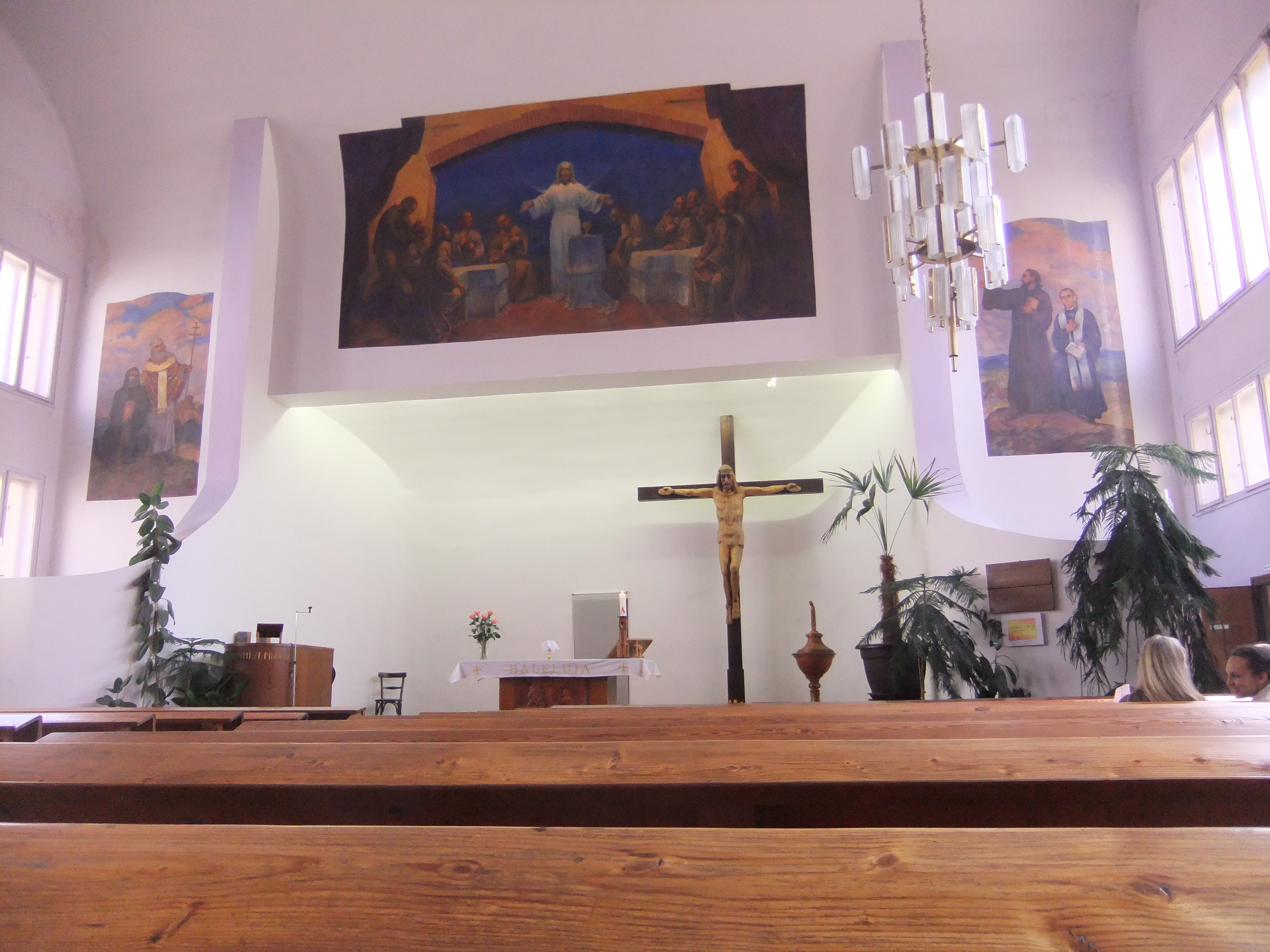 Husitský kostel ve Vršovicích (interiér)